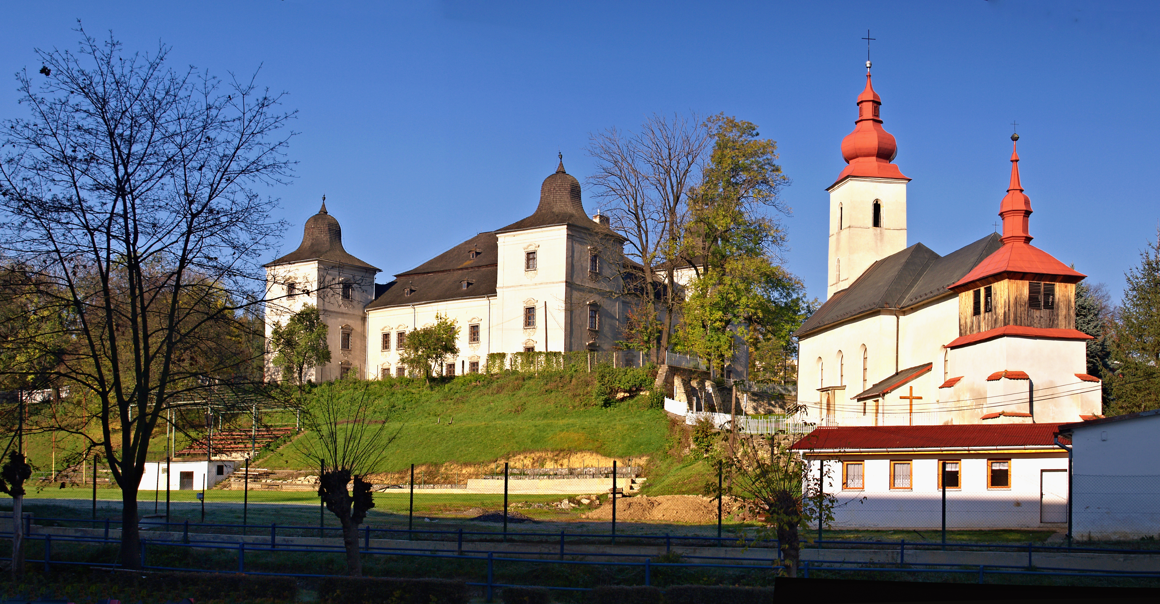 Hanušovce nad Topl'ou - Manoir museum et église catholique